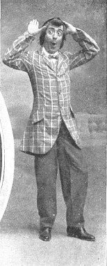 Salvador Videgain, en la obra La corte del porvenir, fotografía de Diego Calvache Gómez de Mercado recogida en la revista española Mundo Gráfico.